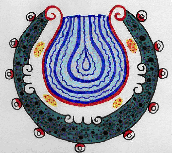 Dibujado en base al Códice Borgia